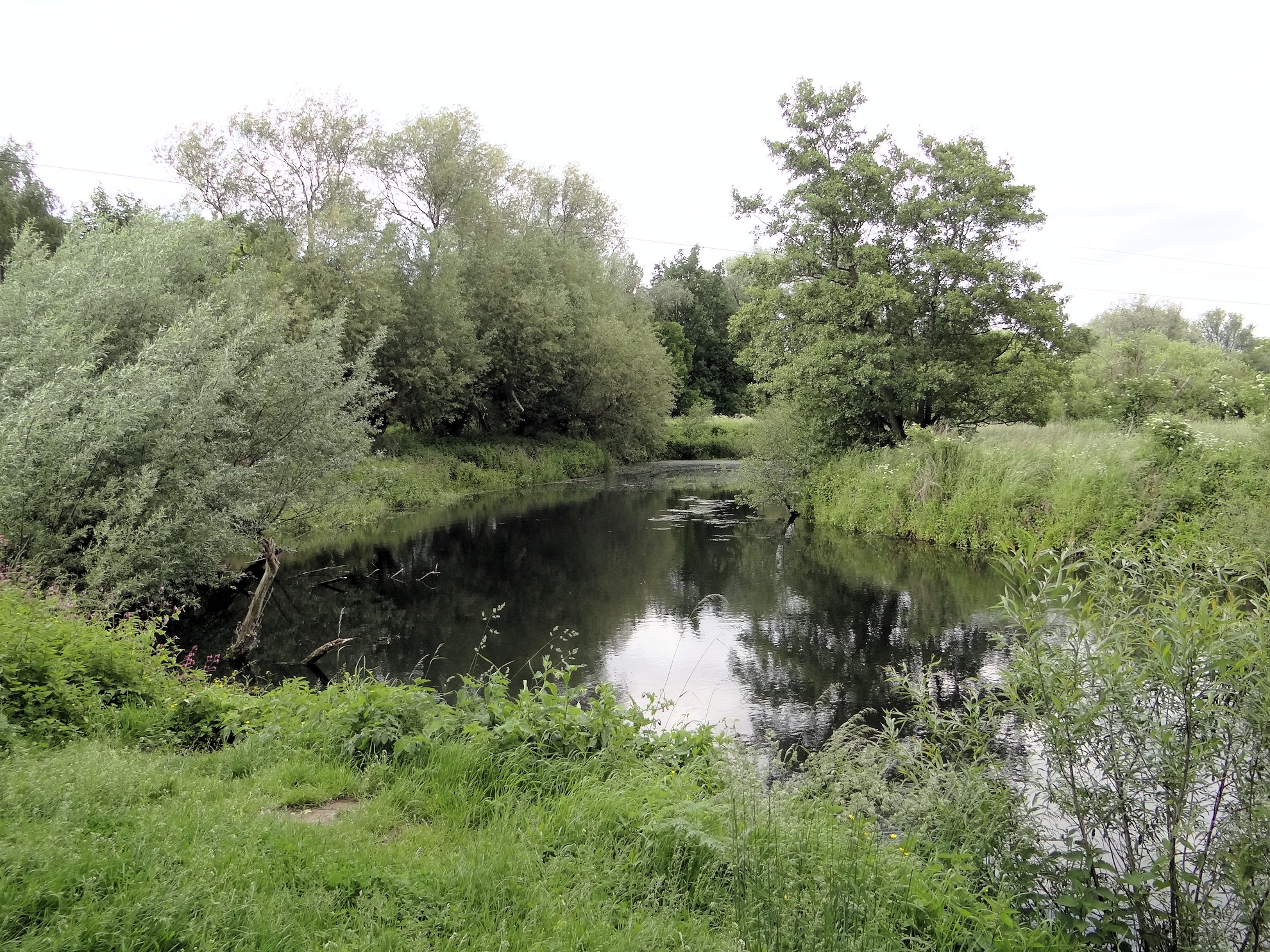 Toter Seitenarm der Oker "Insel" in Stöckheim 2012.